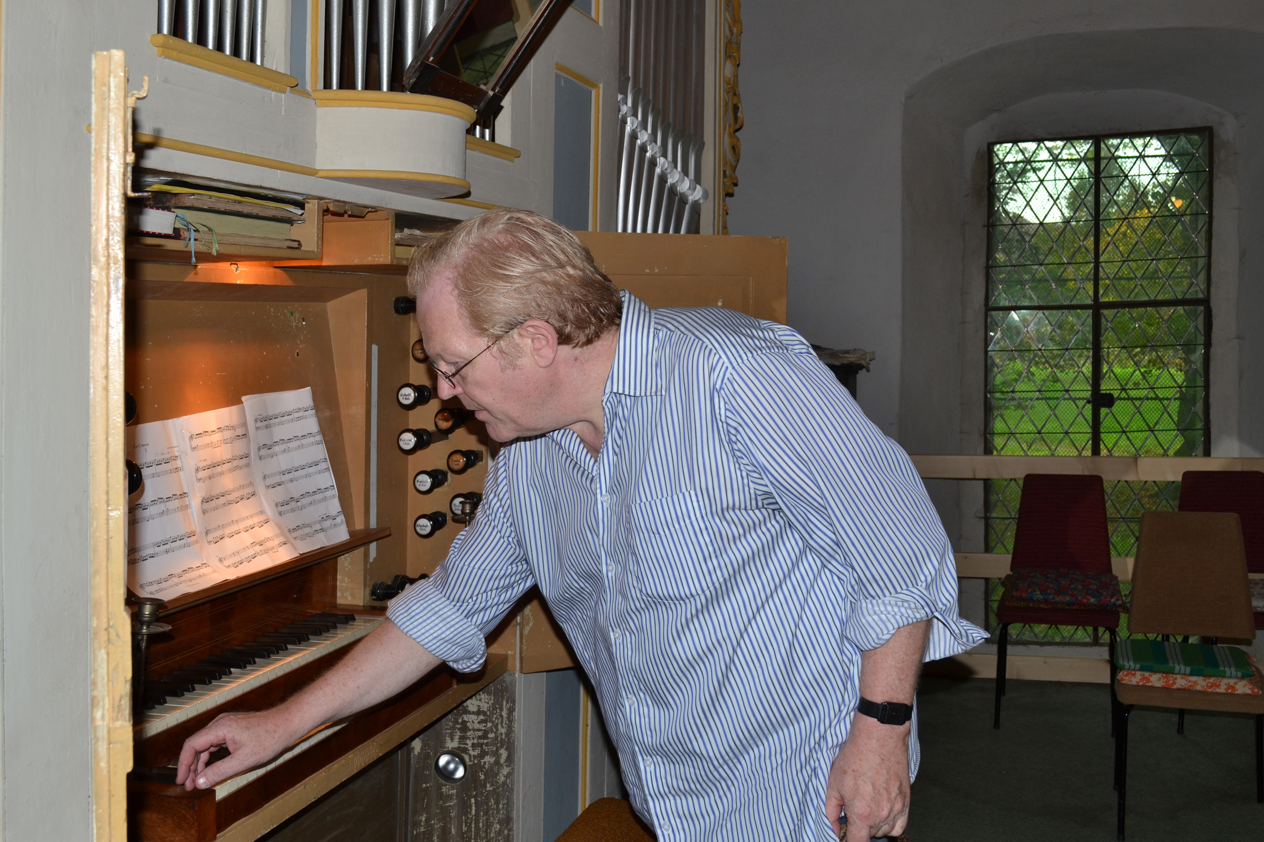 Quedlinburger Domkantor Gottfried Biller kurz vor Beginn eines Orgenkonzertes in der Westerhäuser Dorfkirche.